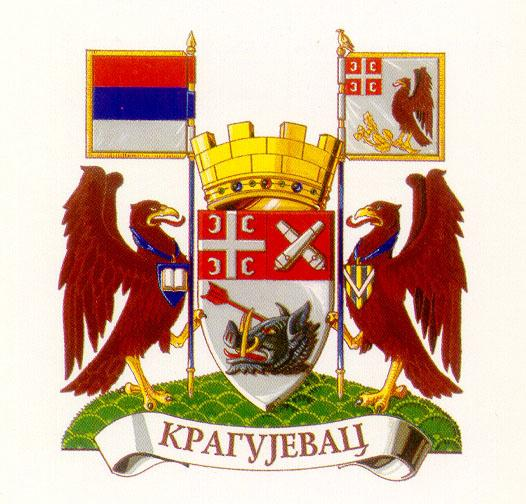 Coat of arms of Kragujevac, one of the more imortant cities in Serbia/Blason de la ville de Kragujevac, l'une des villes les plus importantes de Serbie